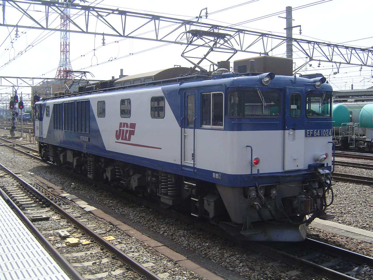 JR貨物EF64形（1000番台）電気機関車（EF641024。更新車）2006年5月15日八王子駅